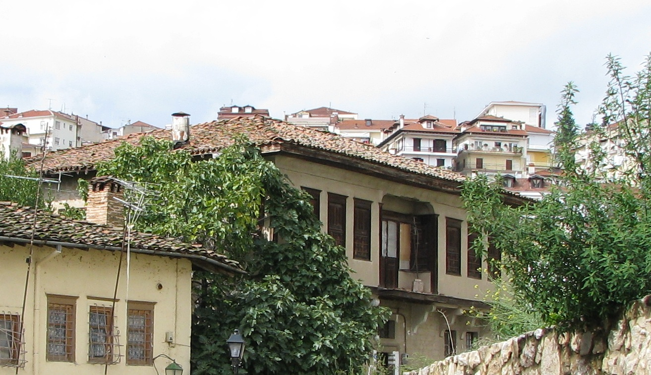 Старият град в Костур, Егейска Македония, Гърция.